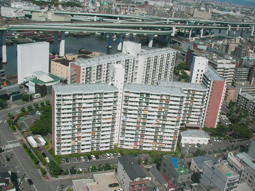 みなと遊園跡地に建つ天保山第五コーポ。